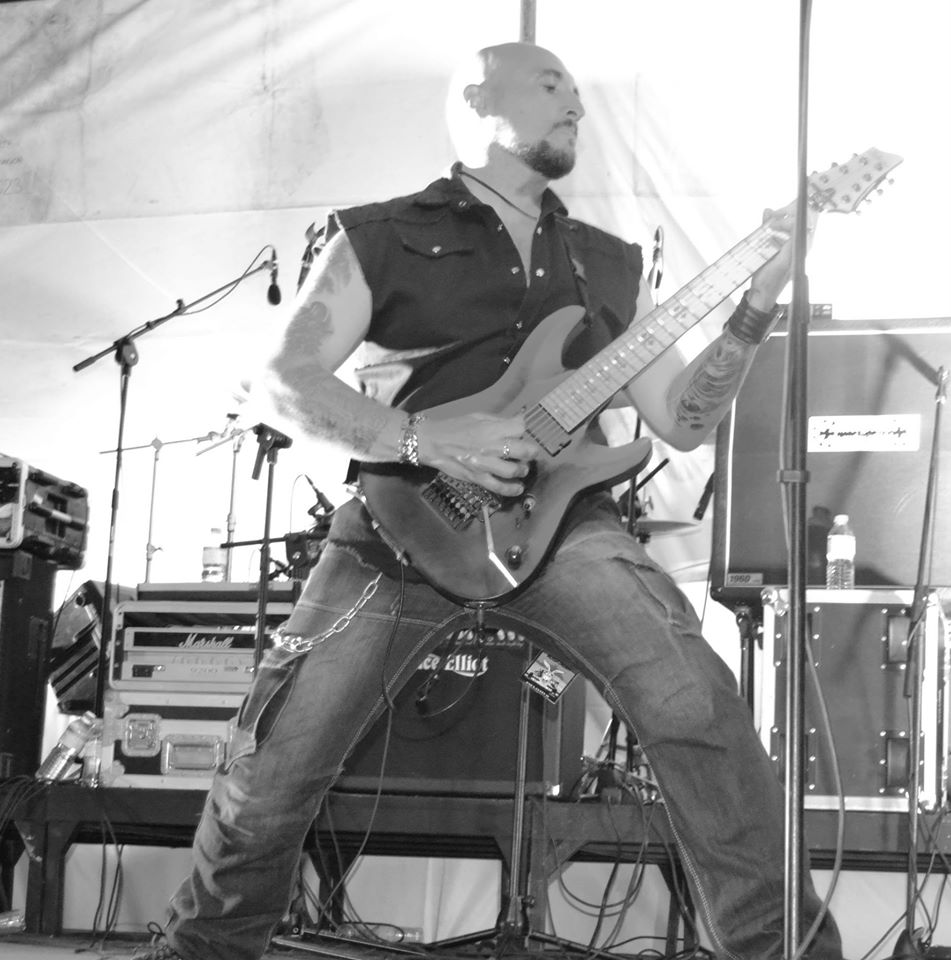 Esclavitud